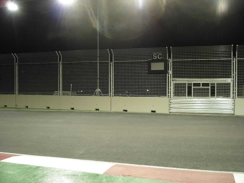 Singapore digital marshall